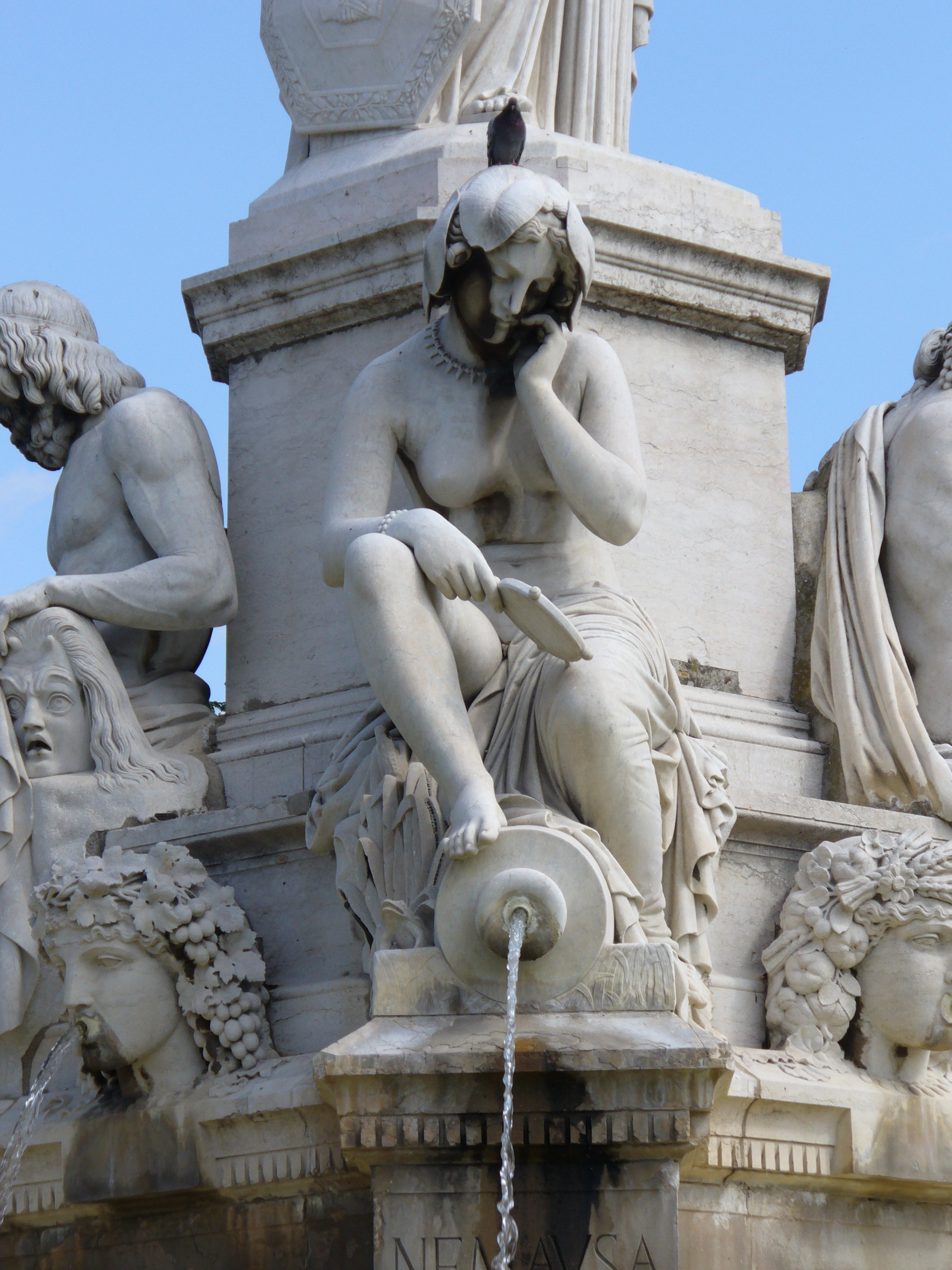 Nimes-Fontaine de Pradier-Pradierbrunnen